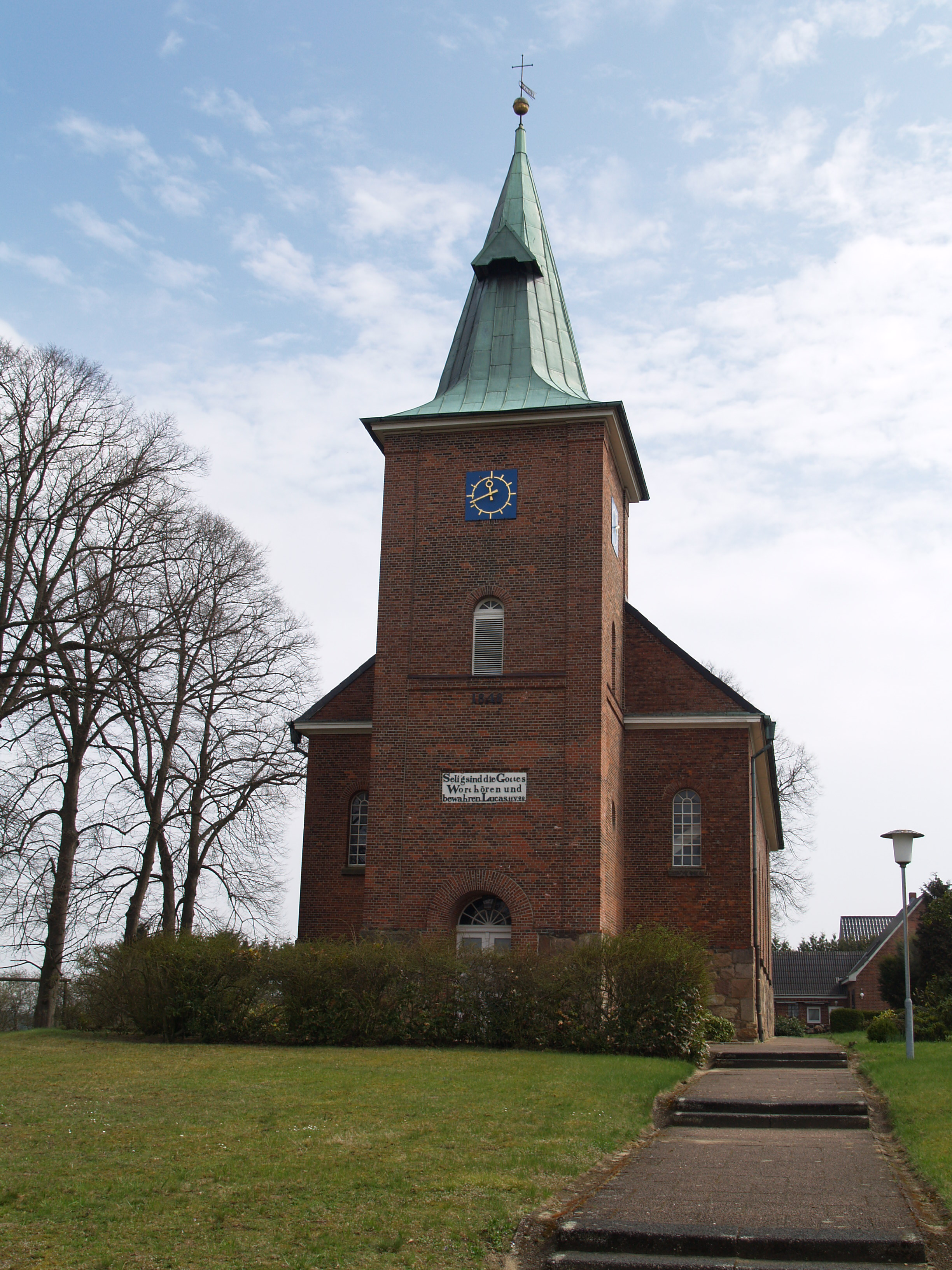 Kirche in Hamwarde, Herzogtum Lauenburg, Deutschland